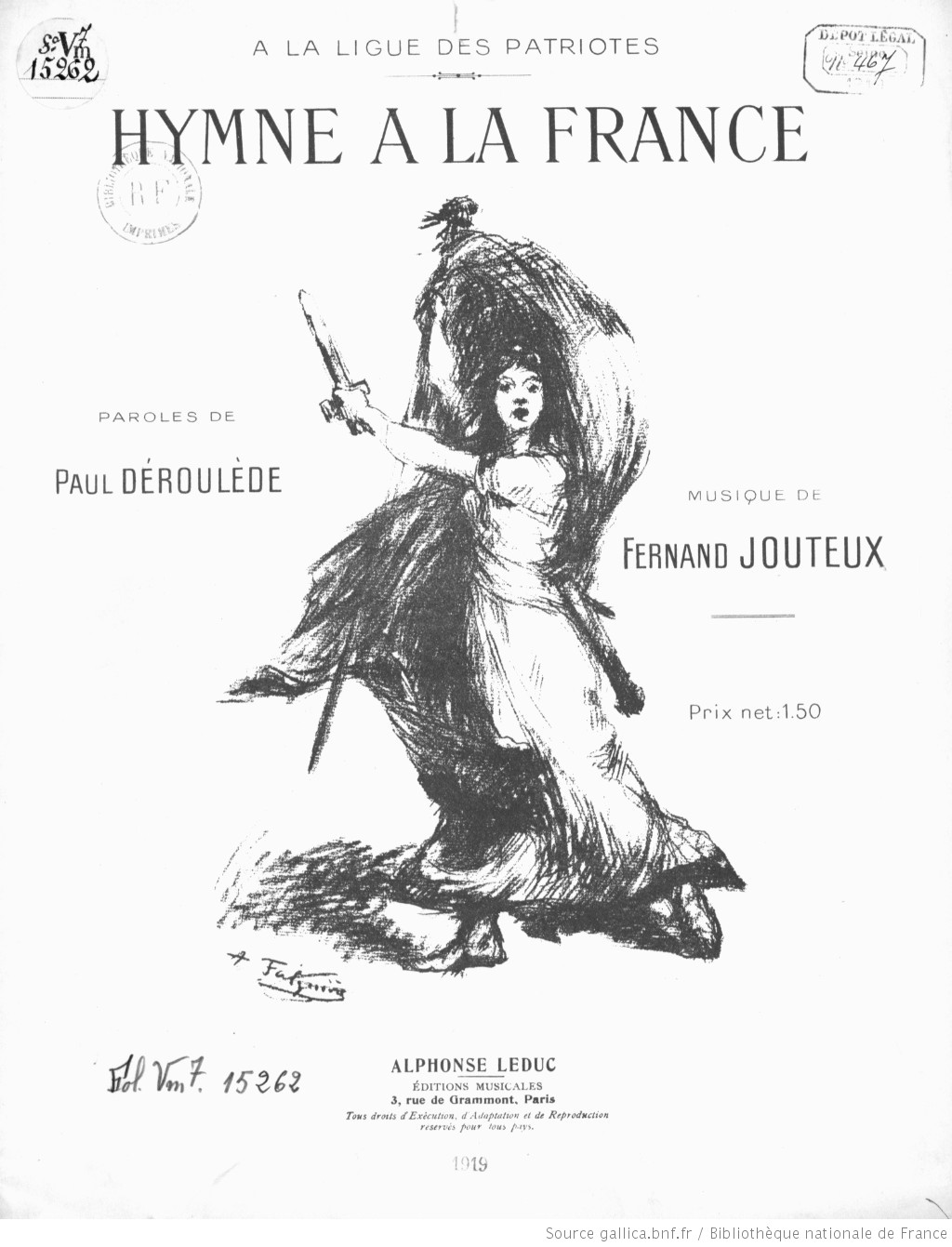 Hymne à la France, paroles de Deroulède, musique de Jouteux, 1914